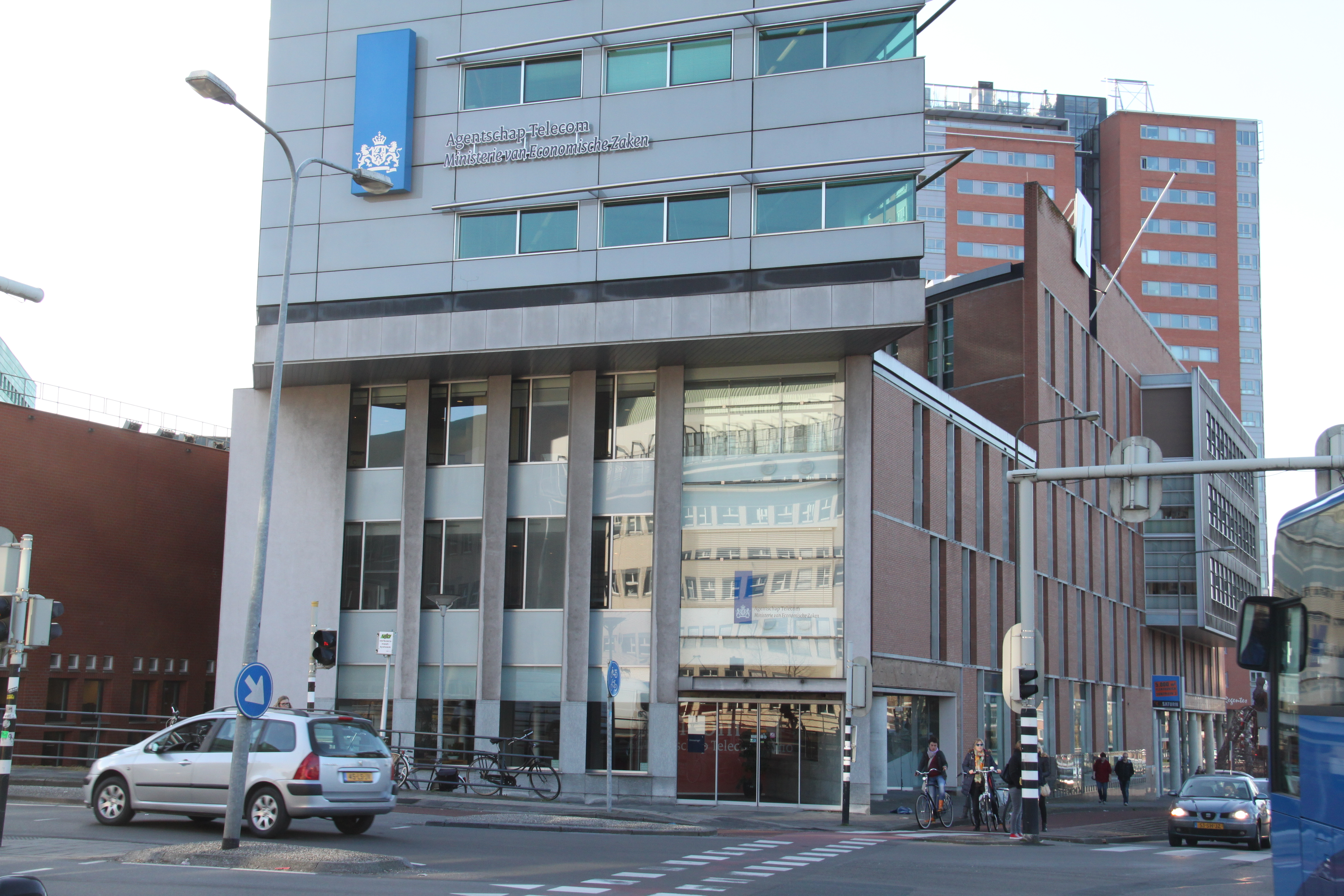 Het gebouw van het Agentschap Telecom in Groningen